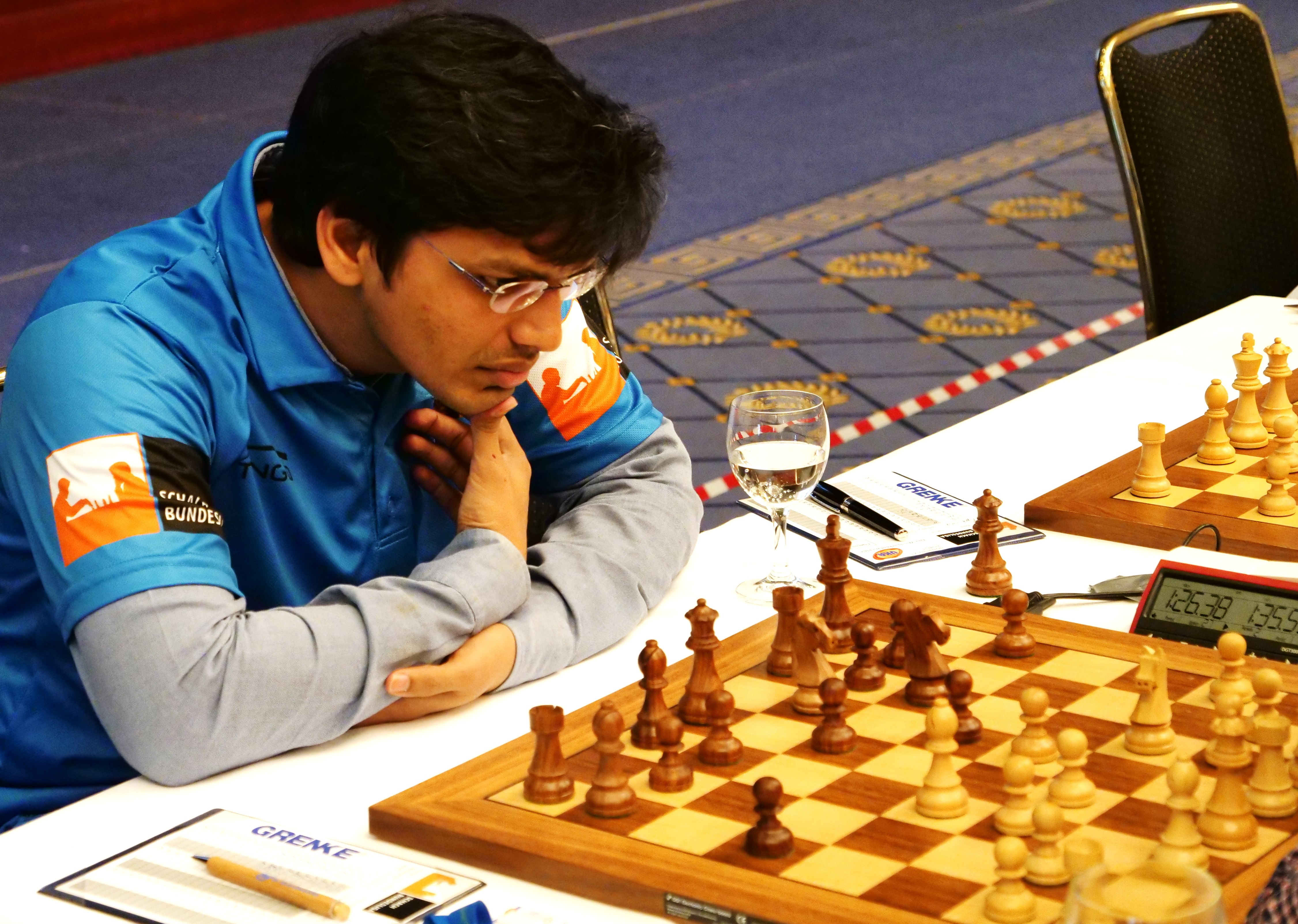 Pentala Harikrishna Bundesliga-Endrunde 30-4-2018